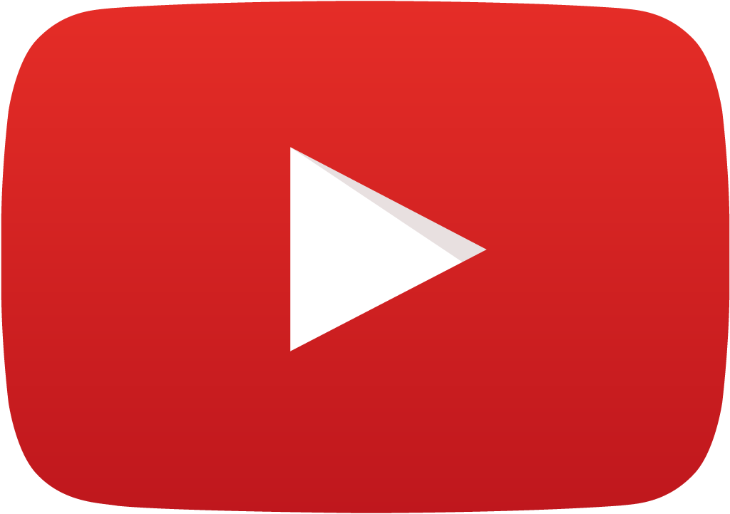 YouTube-icon